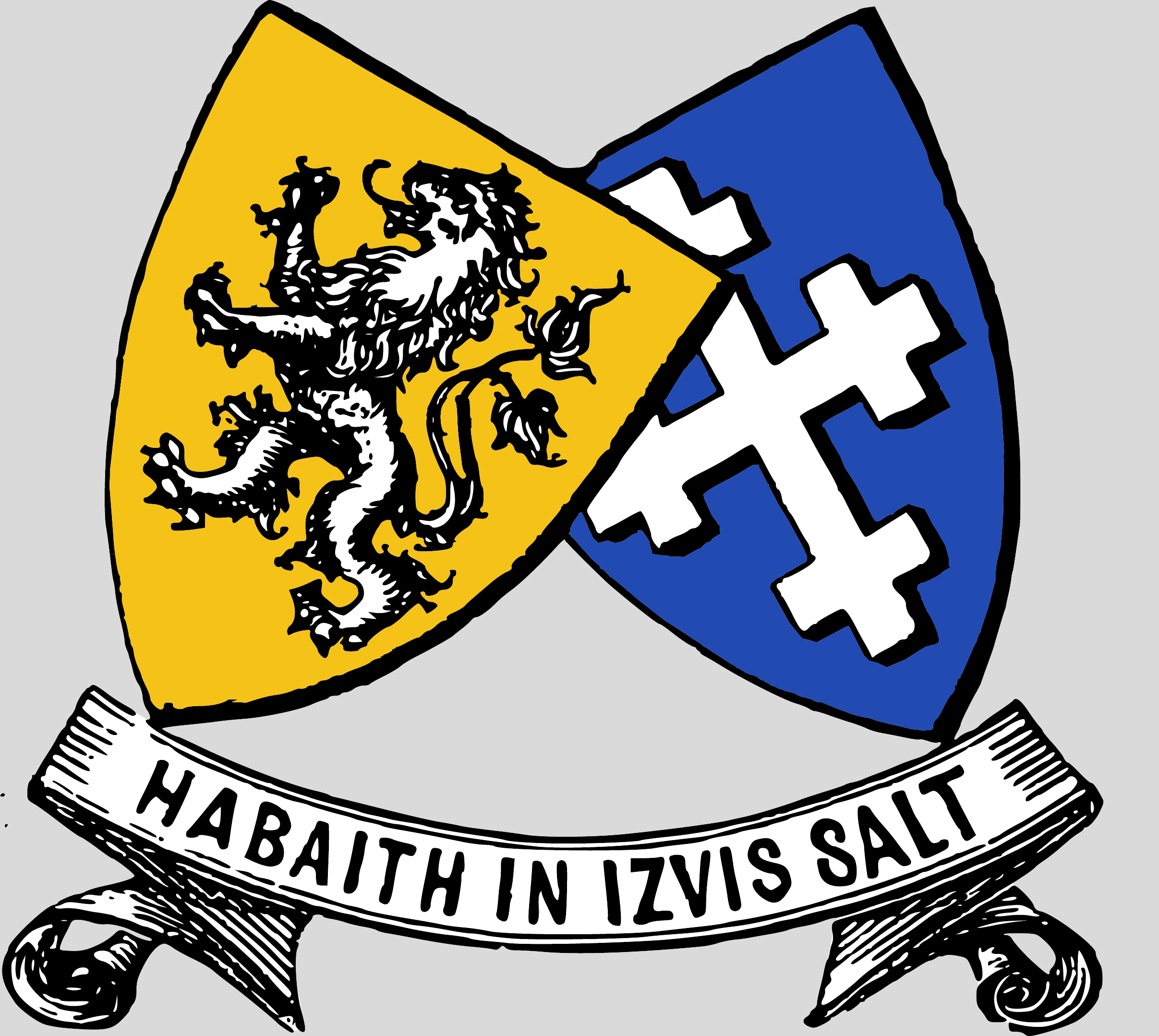 Wappen des Neuenheim College, Vorgänger des Heidelberg College